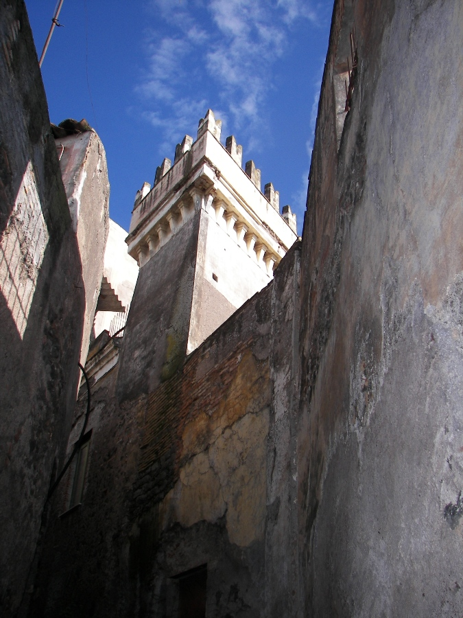 Torre di Palazzo Bruno, riviviscenza romanticistica del secolo XIX. Santa Maria di Licodia. (Ct)